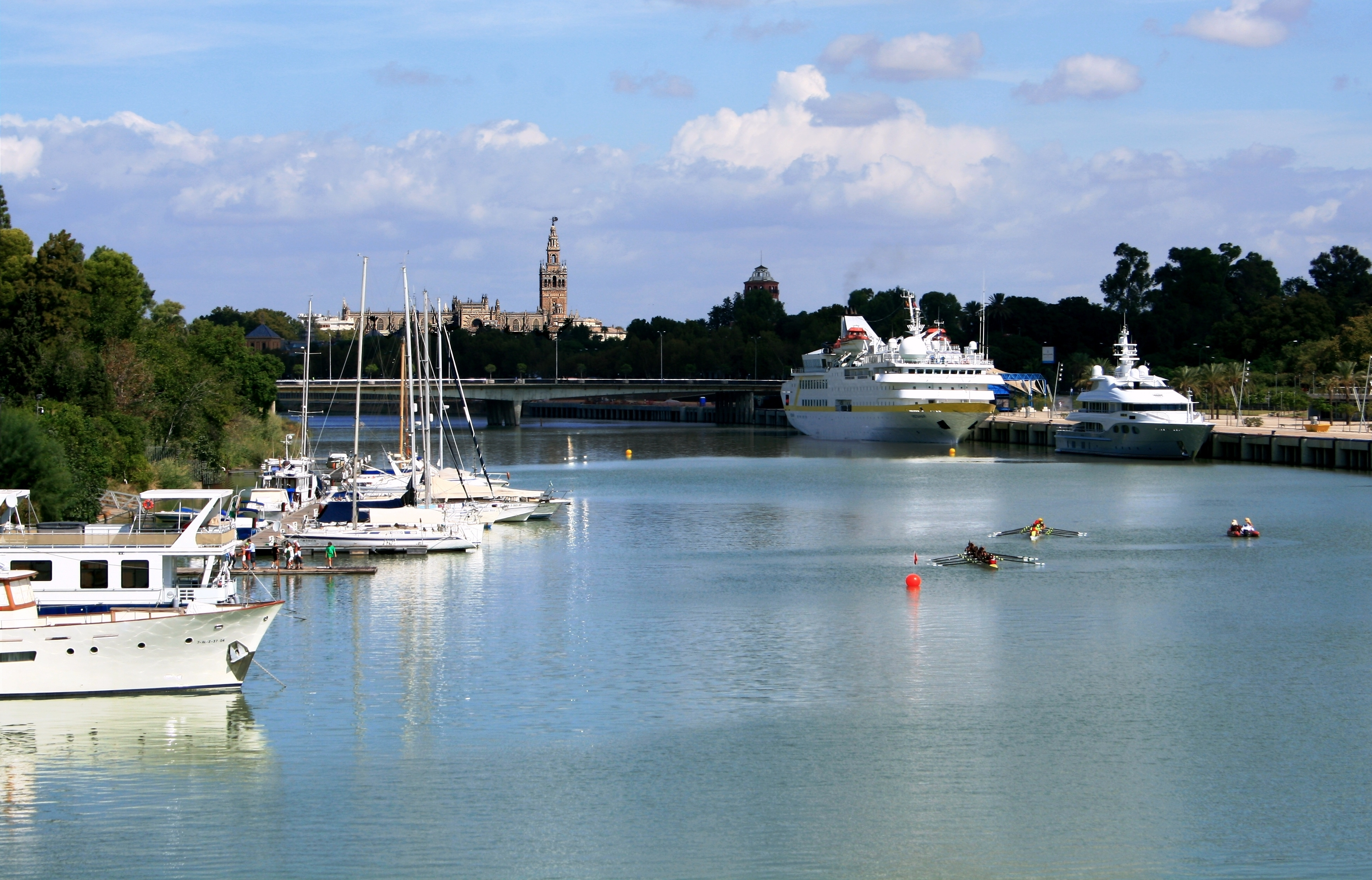 Panorámica de Sevilla desde el Canal de Alfonso XIII. A la izquierda de la foto aparece el Club Náutico Sevilla, a la derecha el Muelle de las Delicias y al fondo la Catedral Metropolitana de Santa María de la Sede y su torre campanario, conocida popularmente como Giralda.